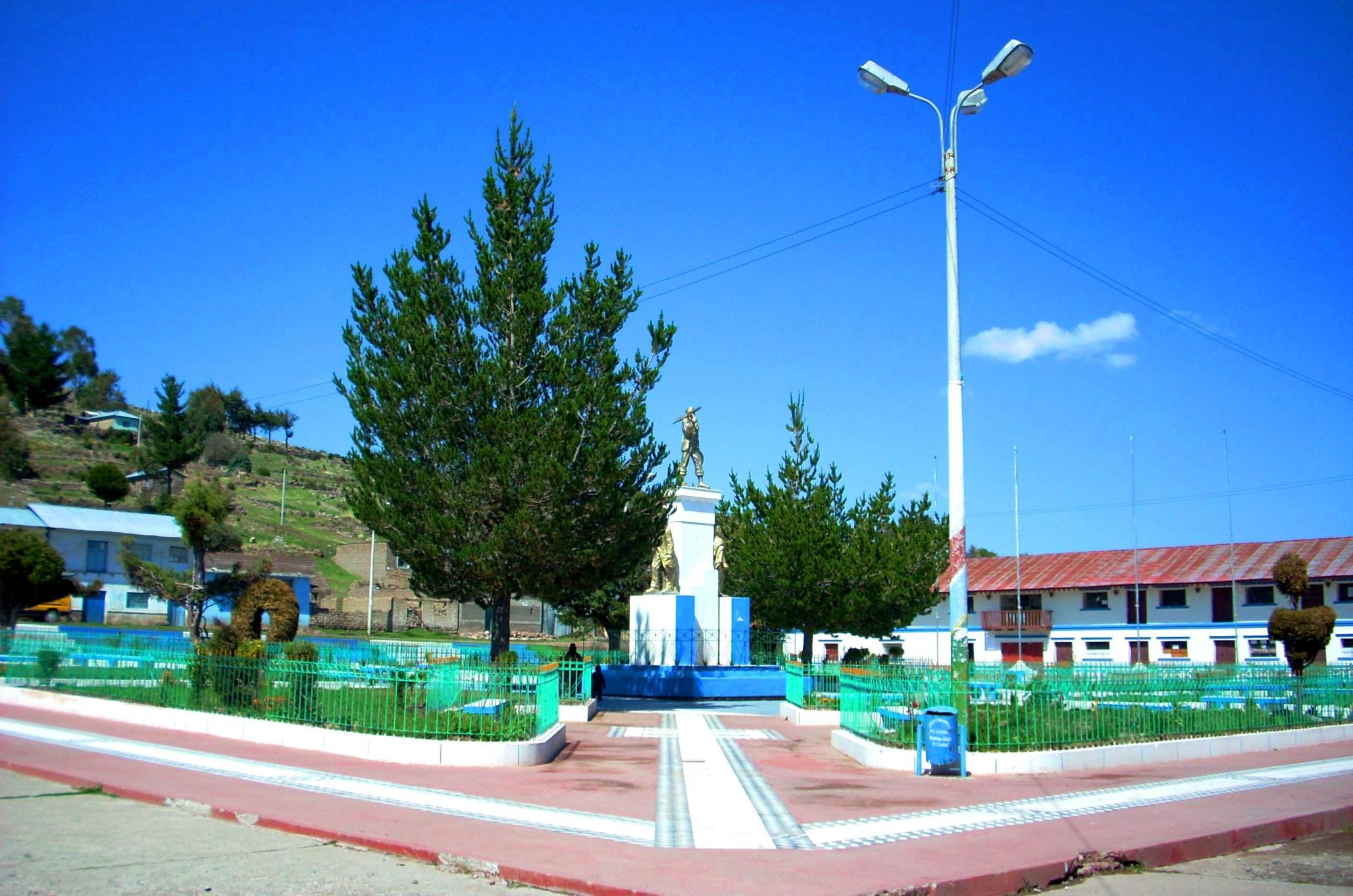 Vista lateral de la plaza principal del distrito de PLATERIA, provincia de PUNO.